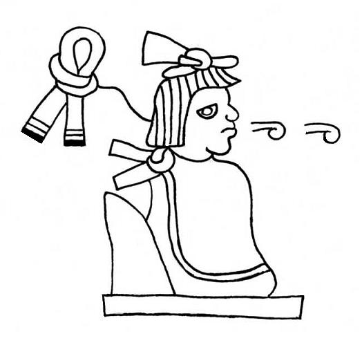 Imagen reprografiada del Códice Xolotl, lámina 6. Que representa a Maxtlatl señor de Azcapotzalco, sentado en un trono (icpalli) y con su nombre pictográfico representado por un ceñidor o taparrabos (cinta anudada).